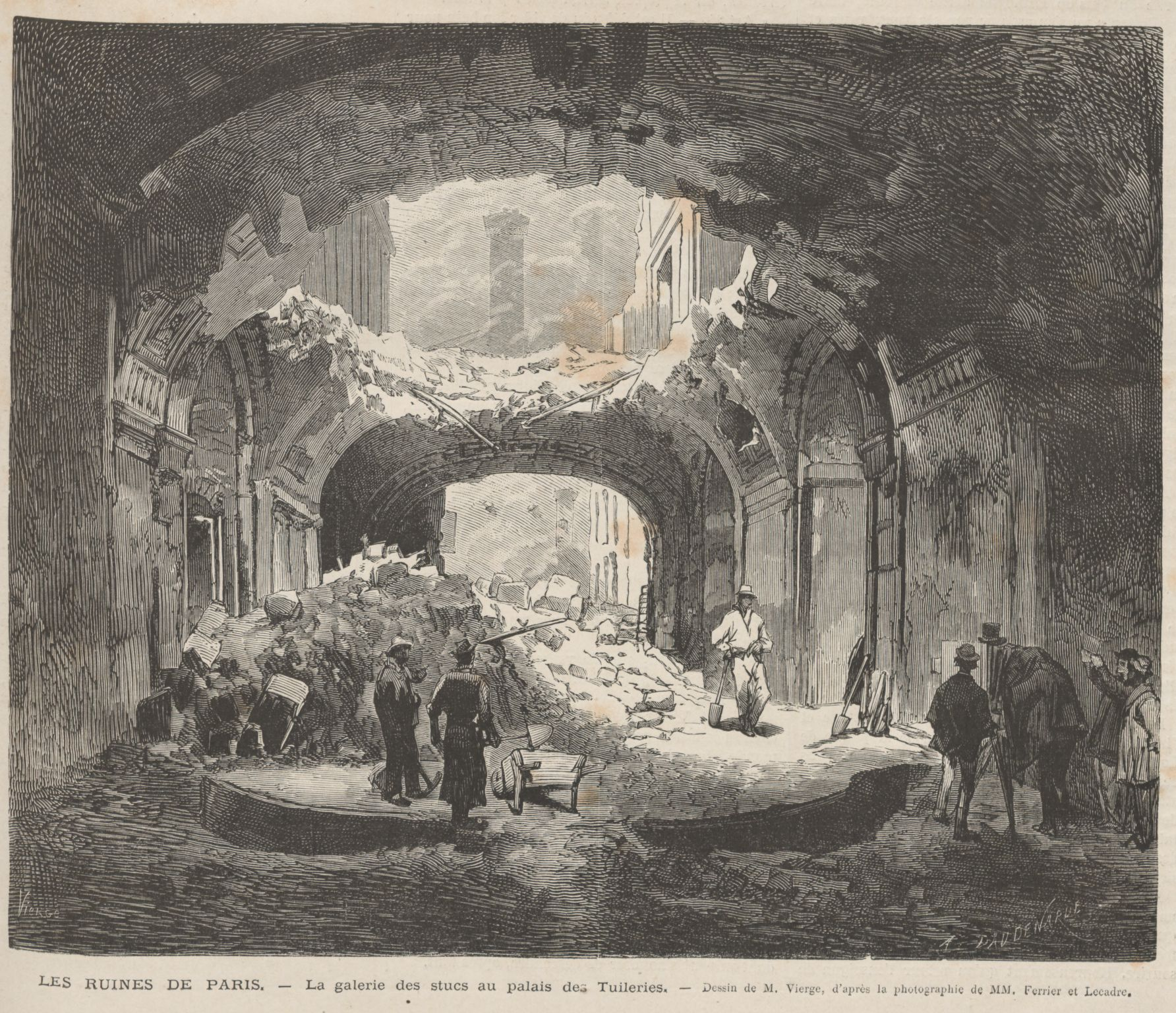 Les ruines de Paris. — La galerie des stucs au palais de Tuileries.— (Dessin de M. Vierge, d'après la photographie de MM. Ferrier et Lecadre), de Daniel Vierge Urrabieta, en la revista Le Monde Illustré.